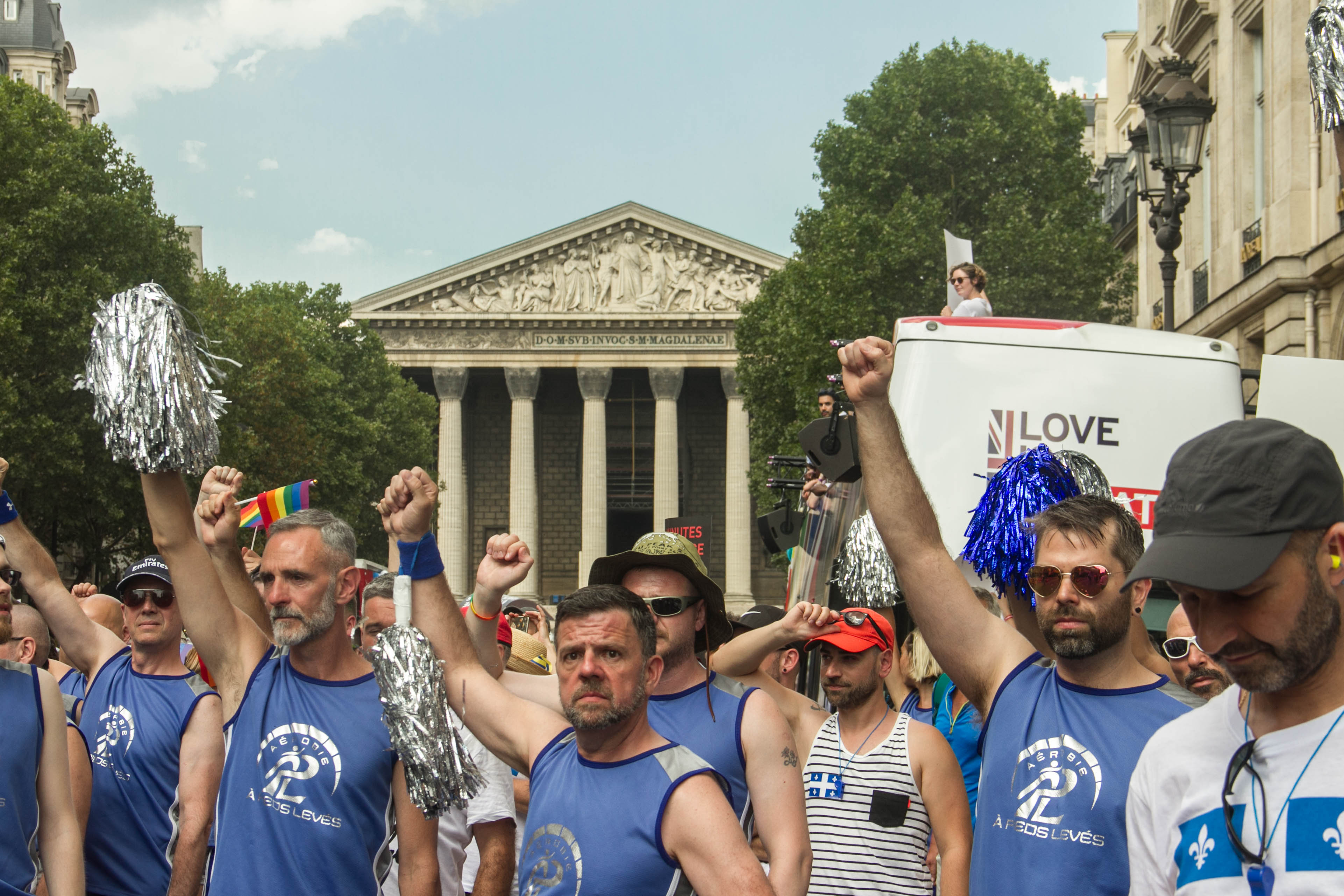 Trois minutes de silence en hommage aux victimes du SIDA.